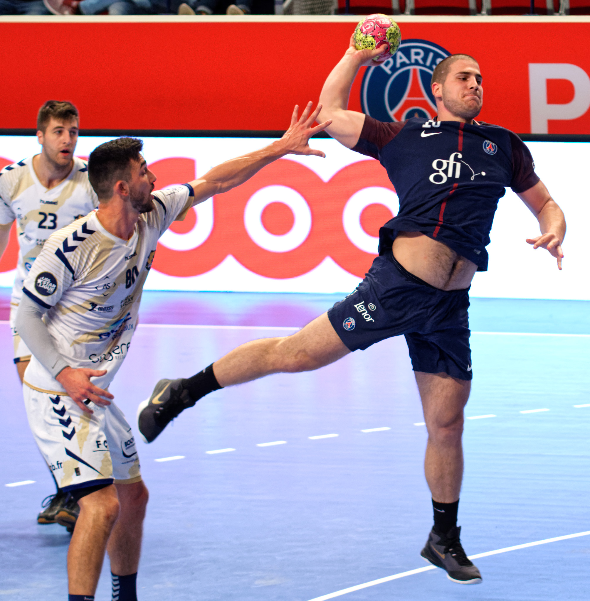 Rencontre de championnat entre le PSG et Massy. A Coubertin, le 20 septembre 2017.